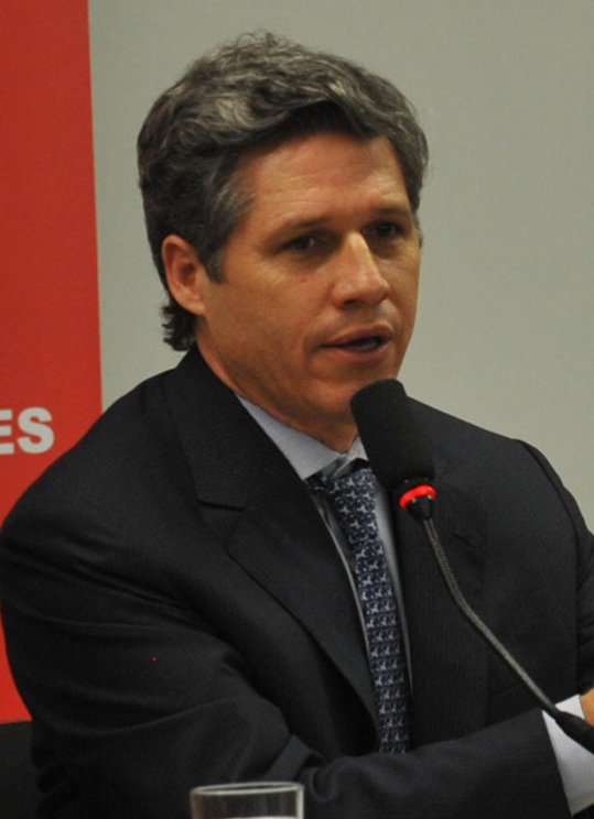 Os deputados José Guimarães, Paulo Teixeira, Jilmar Tatto e o presidente da Câmara, Marco Maia, durante reunião que escolheu Tatto para novo líder do partido na Câmara